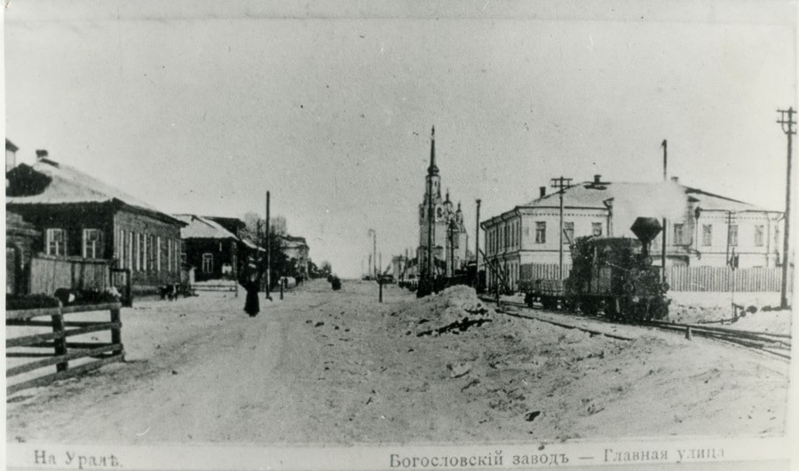 Главная улица в Богословском заводе. Справа - дом управляющего Богословским горным округом и Введенский собор.